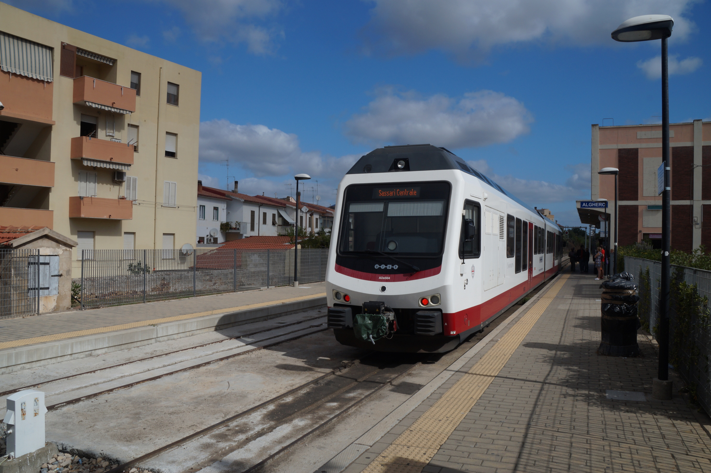 Triebzug ADeS im Bahnhof Alghero